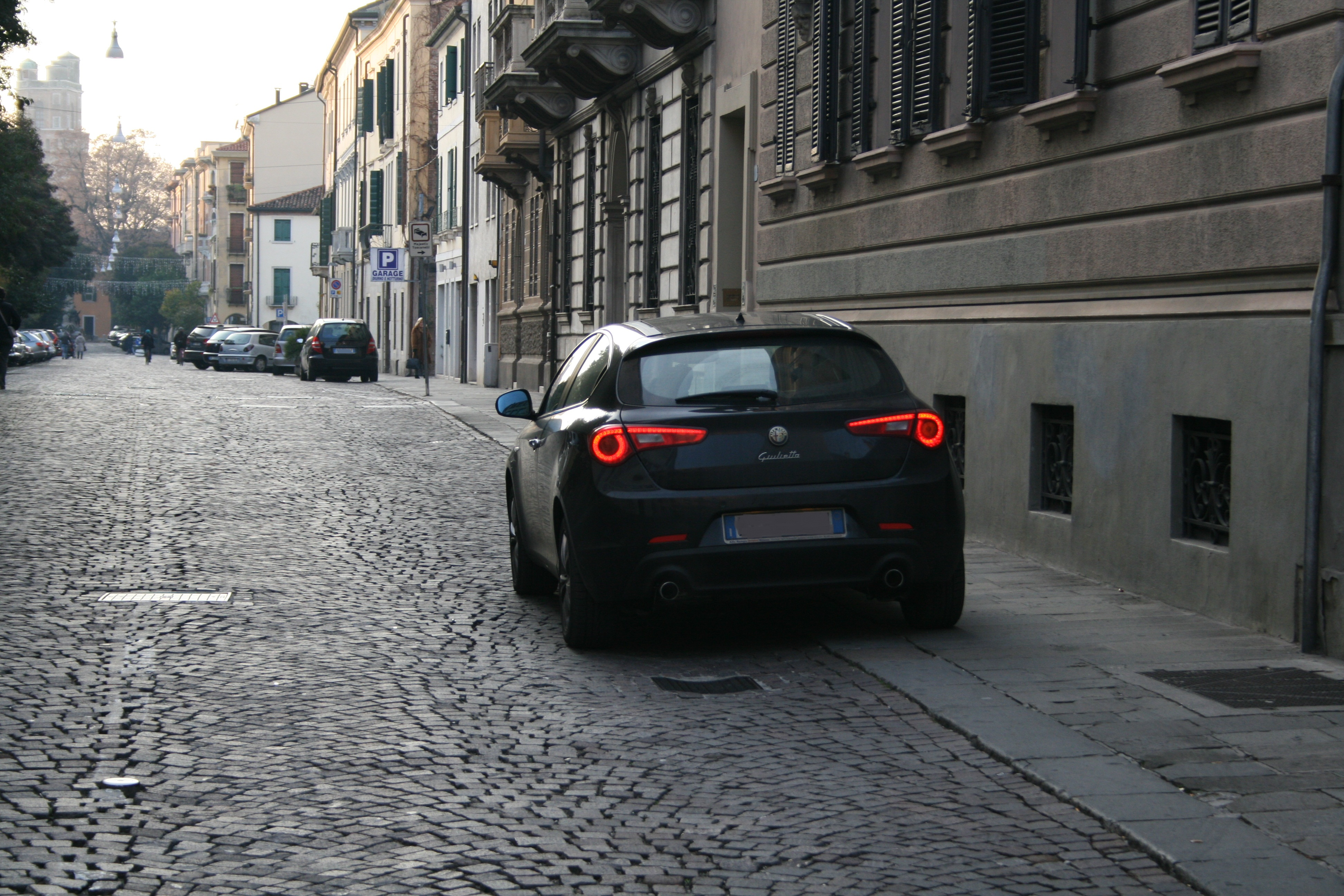 Un'Alfa Romeo Giulietta con i fari di posizione posteriori accesi a Padova